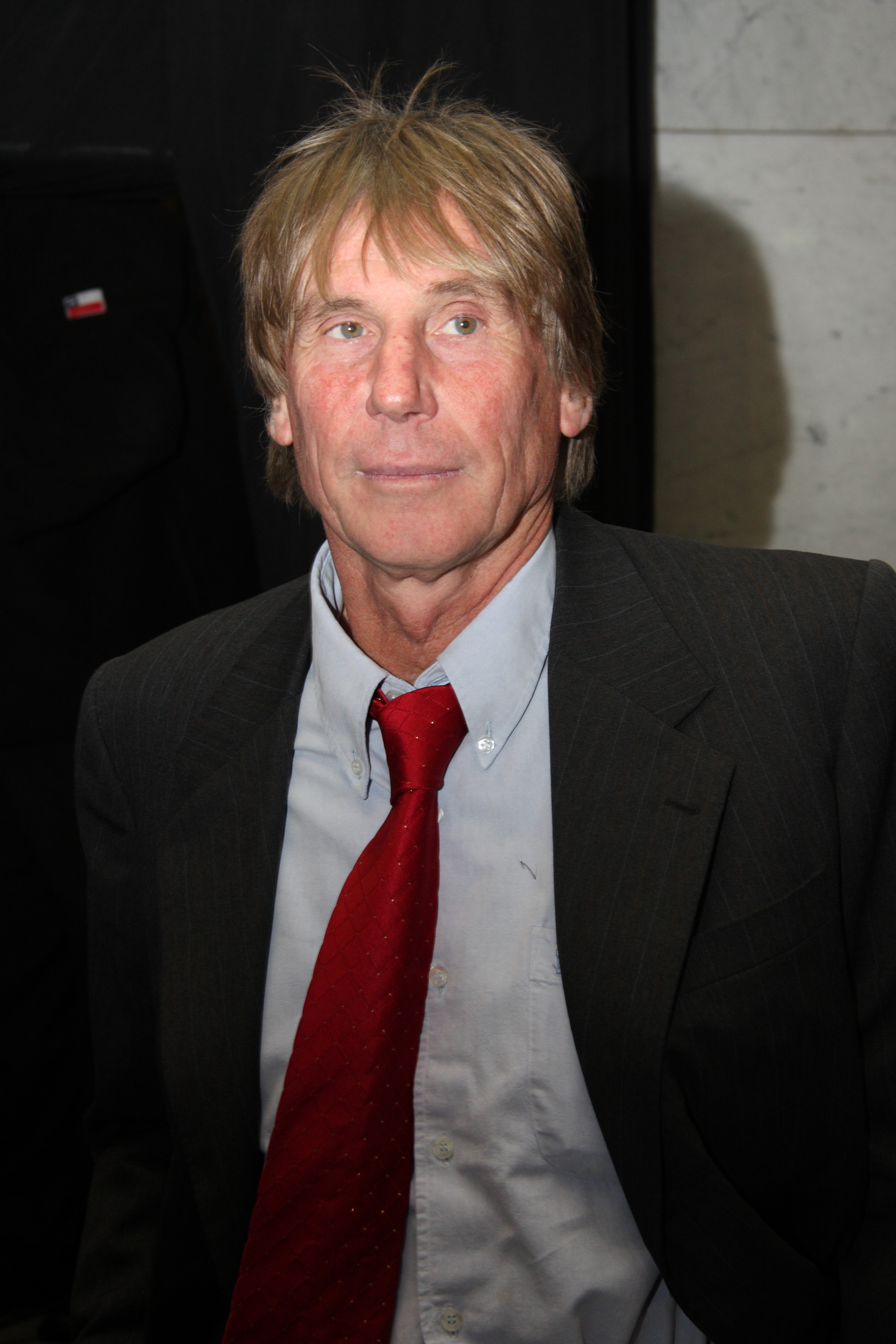 El ex ministro de Hacienda de Chile, Hernán Büchi.